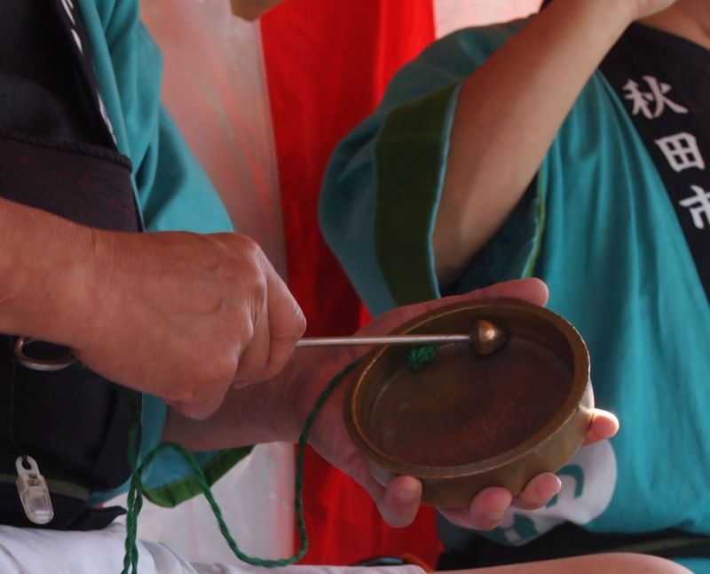 Tsuchizaki-Shinmeisha-Shrine Annual Celebration And The Float Festival (Akita City, Japan)